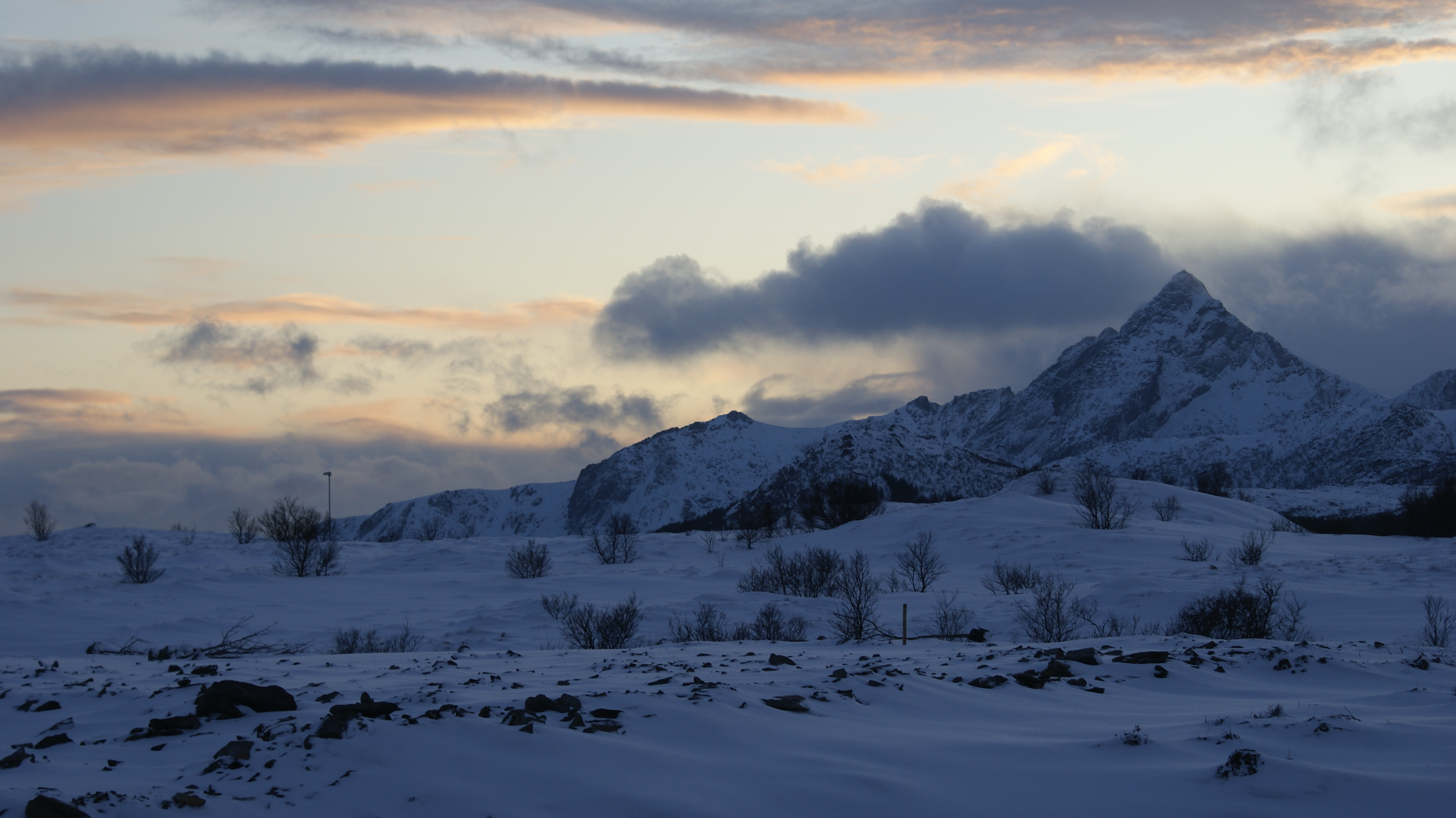 Leknes, Vestvågøya, Lofoten, Norway. View towards Skottinden. Winter evening.